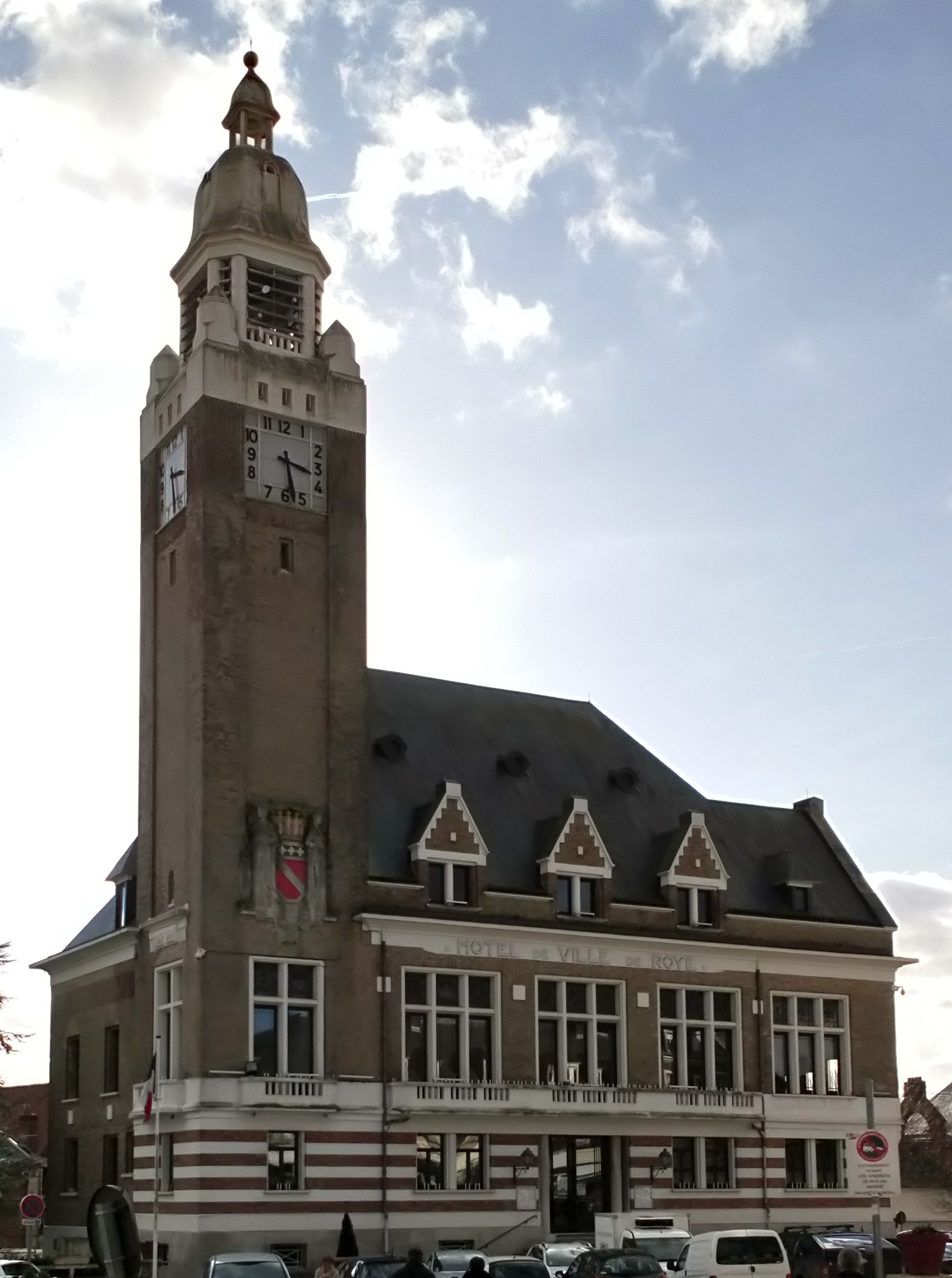 Hôtel de ville de Roye 3